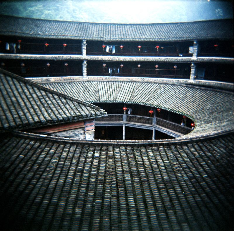 hakka.chinese house